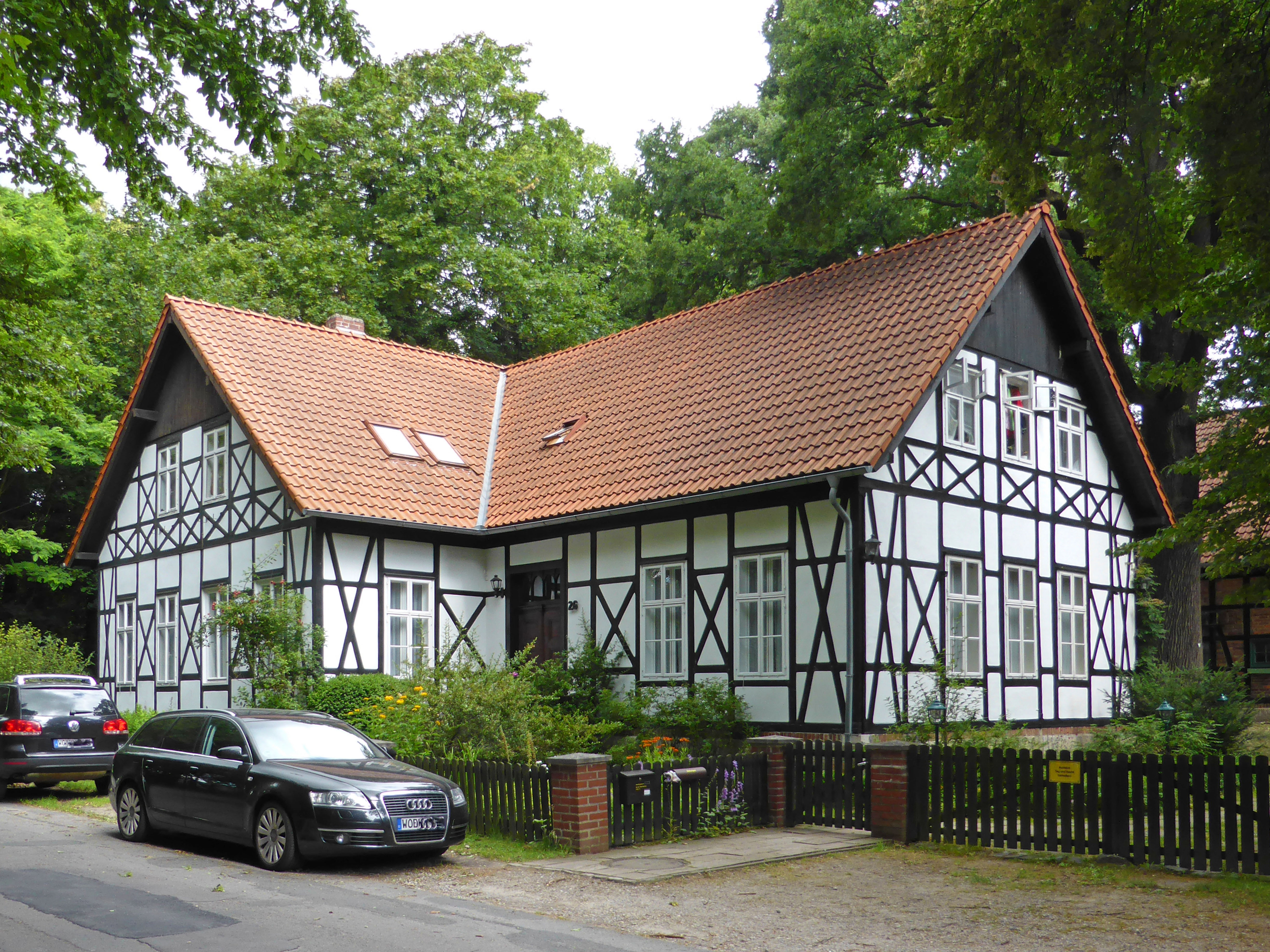 Subudhaus in Wolfsburg (ehemaliges Forsthaus).